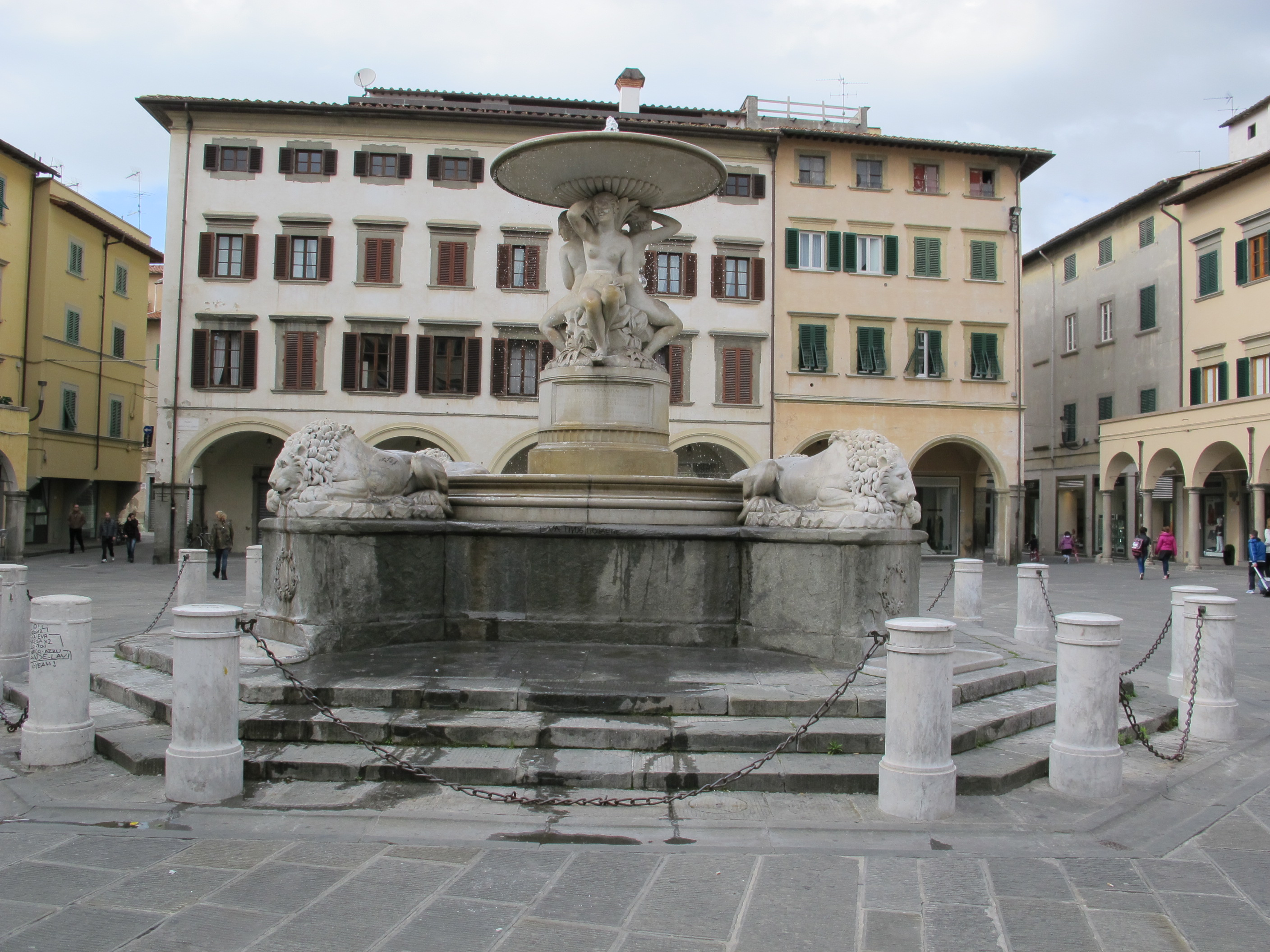 Empoli, piazza farinata 02 fontana